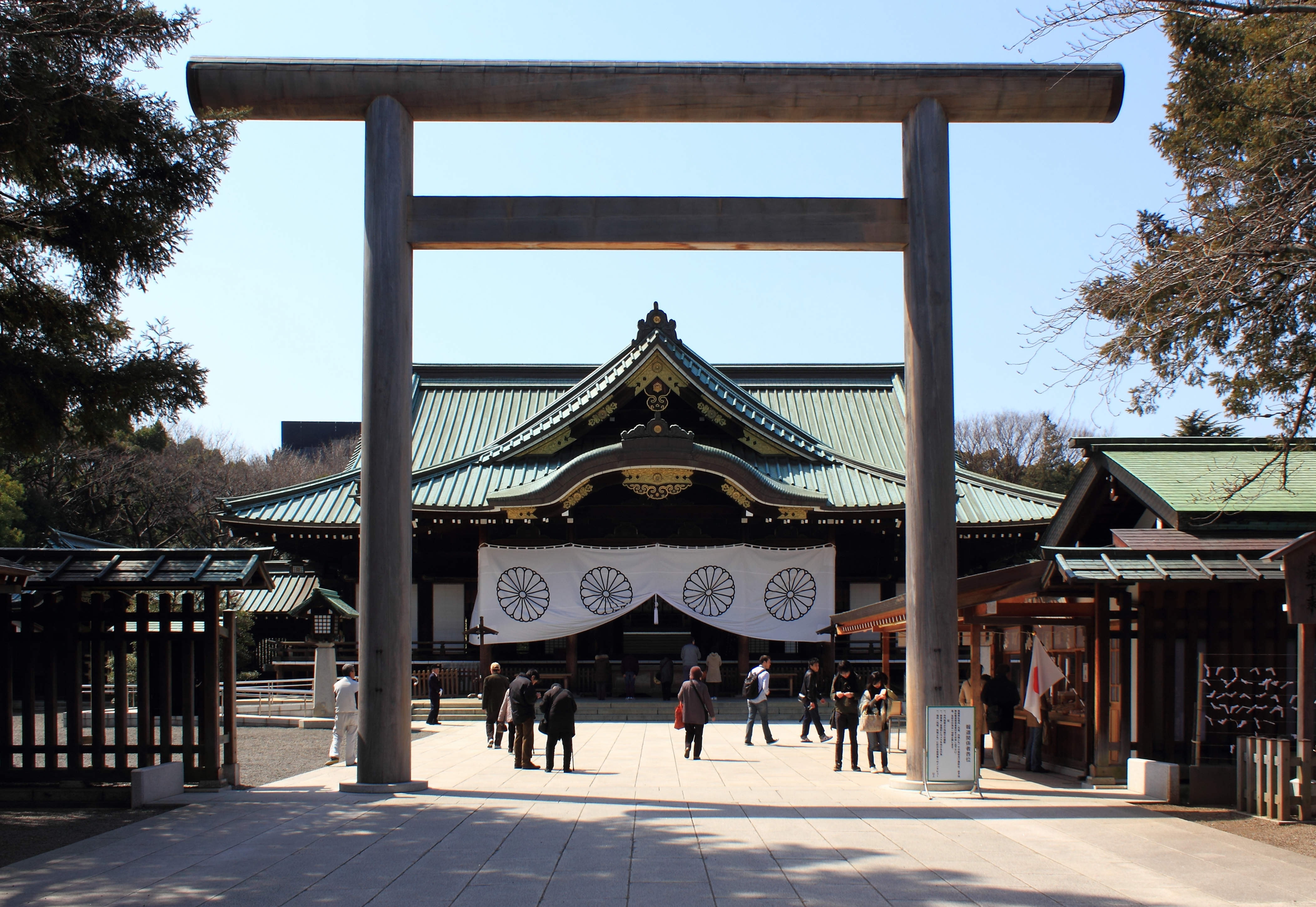 靖国神社（東京都千代田区）